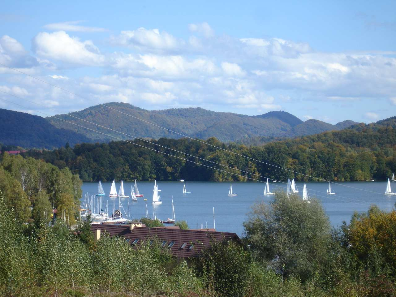 village Polańczyk at Solina Lake